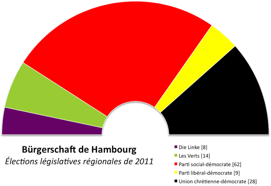 Composition politique du Bürgerschaft de Hambourg après les élections de février 2011.